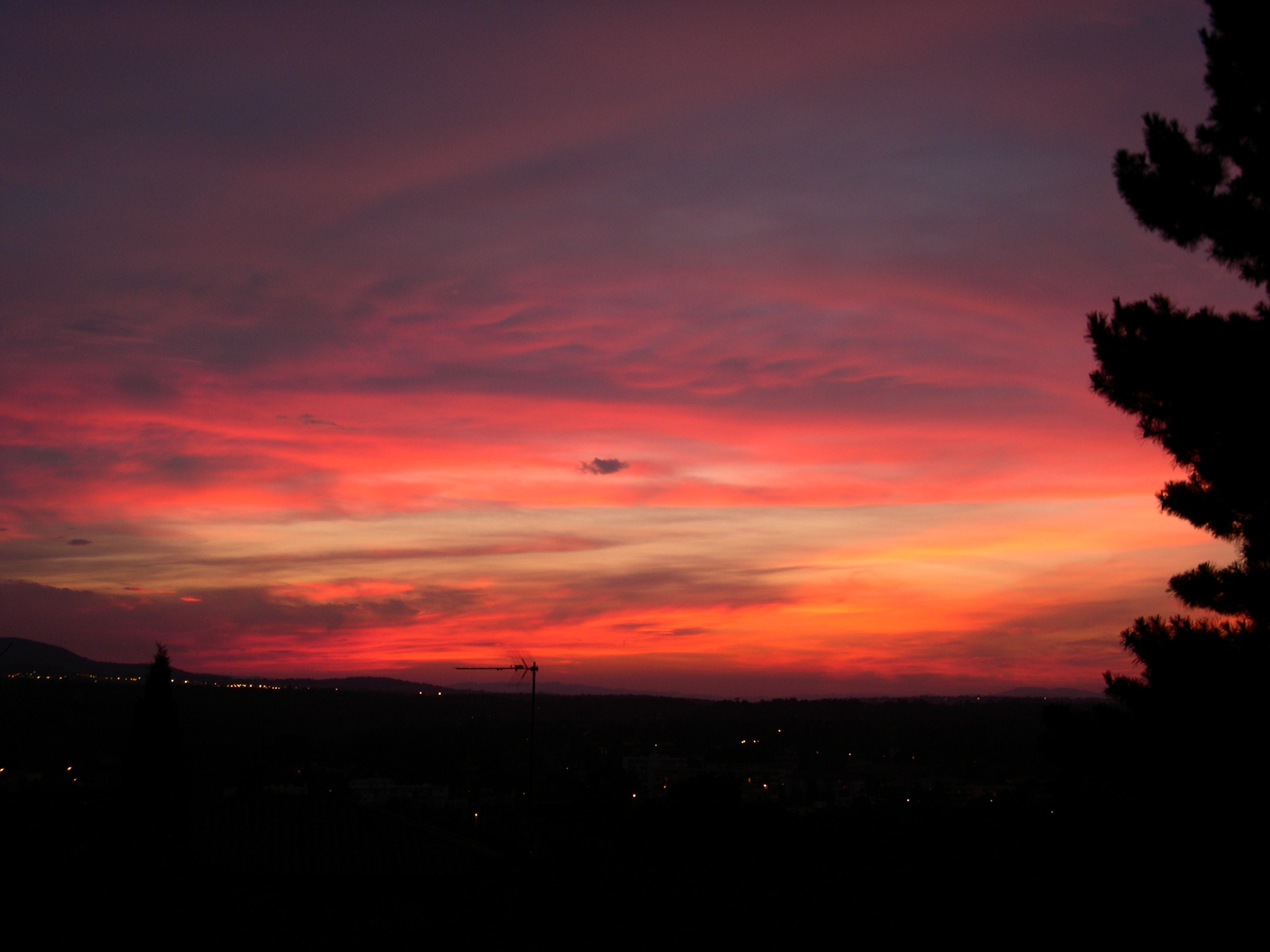 author : Frédéric Bonifas Sunset over the Monts du Lyonnais (France) original colors